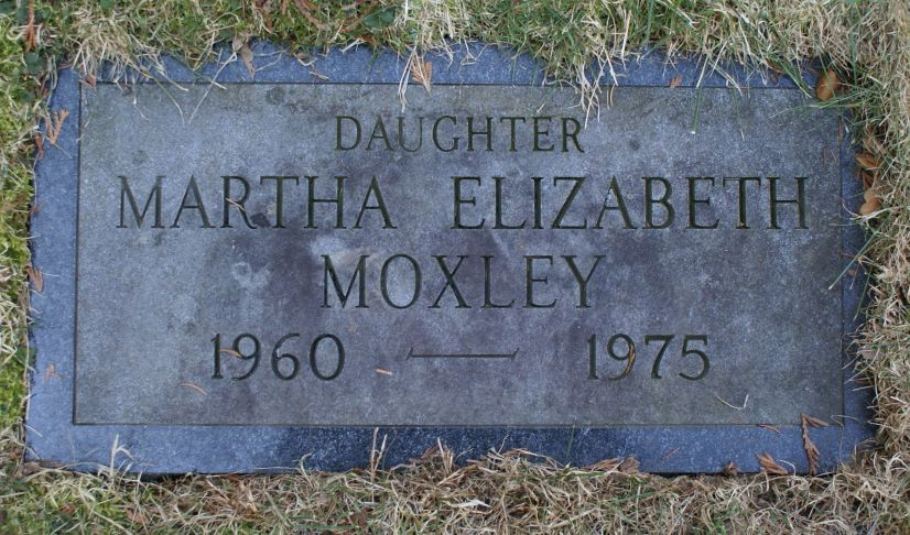 Gravestone von Martha Moxley